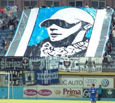 Škripari-transparent